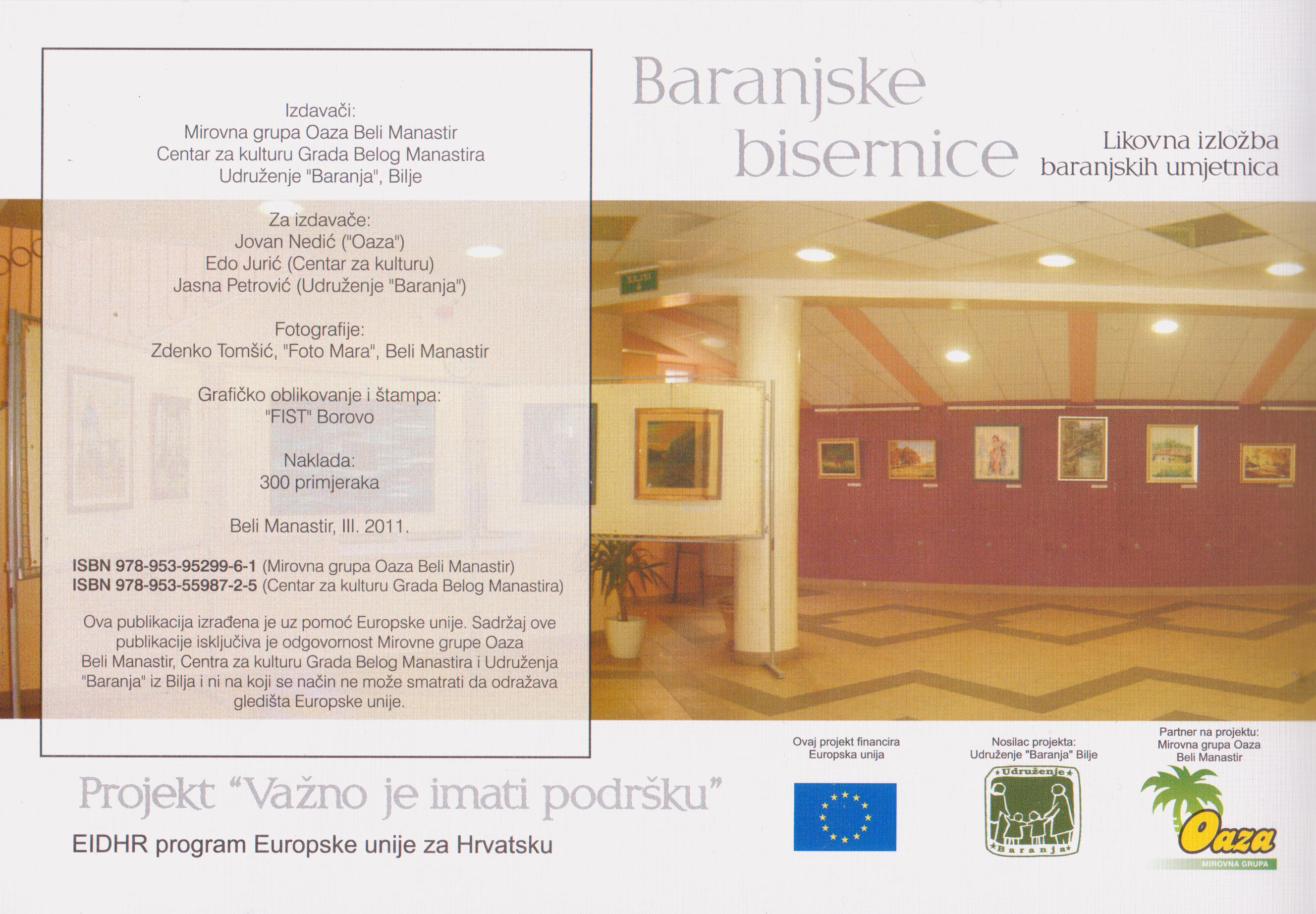 Baranjske bisernice (katalog izložbe), Mirovna grupa Oaza Beli Manastir, 2011, ISBN 978-953-95299-6-1